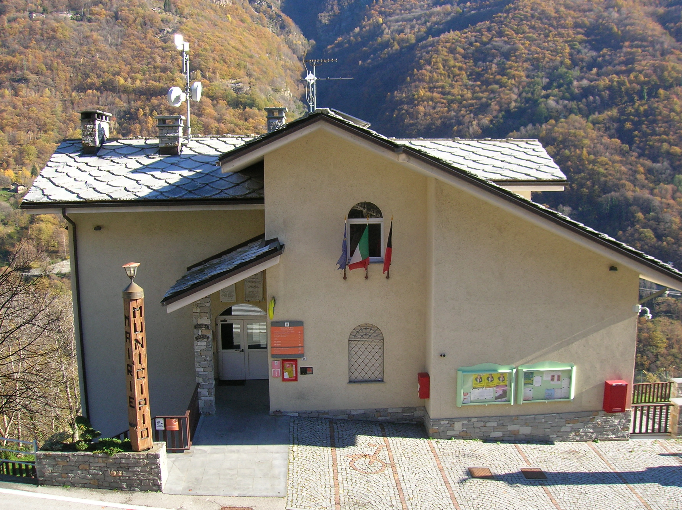 Municipio di Perloz, Valle d'Aosta, Italia.